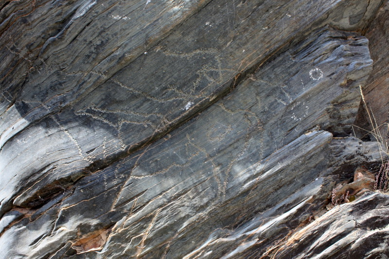 Estación de Arte Rupestre de Siega Verde (Grabados)